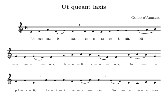 Partition de l'hymne « Ut queant laxis » de Guido d'Arezzo (domaine public).